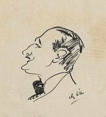 André Gailhard, directeur du Théâtre Fémina : portrait